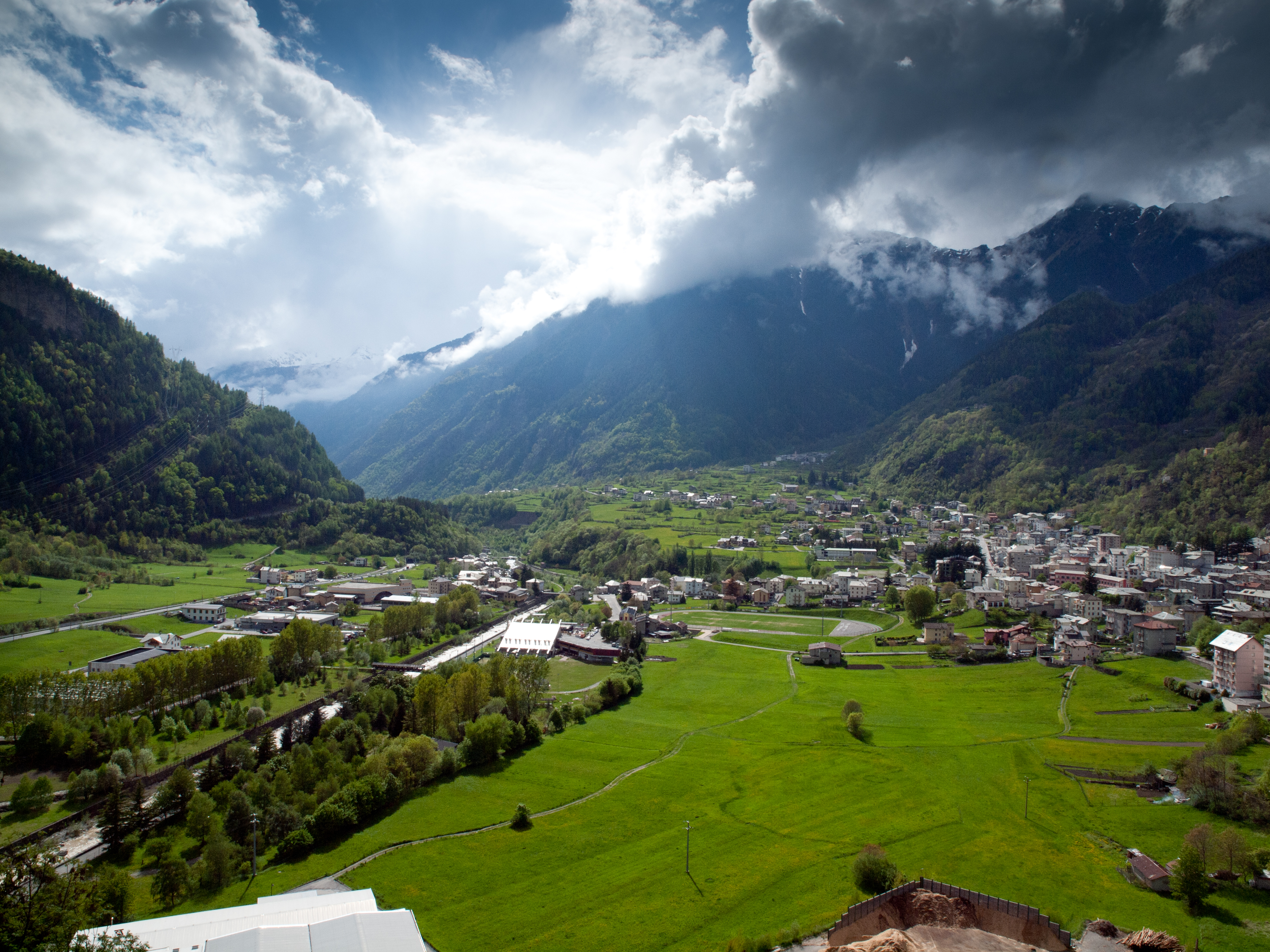 Sondalo, Valtellina